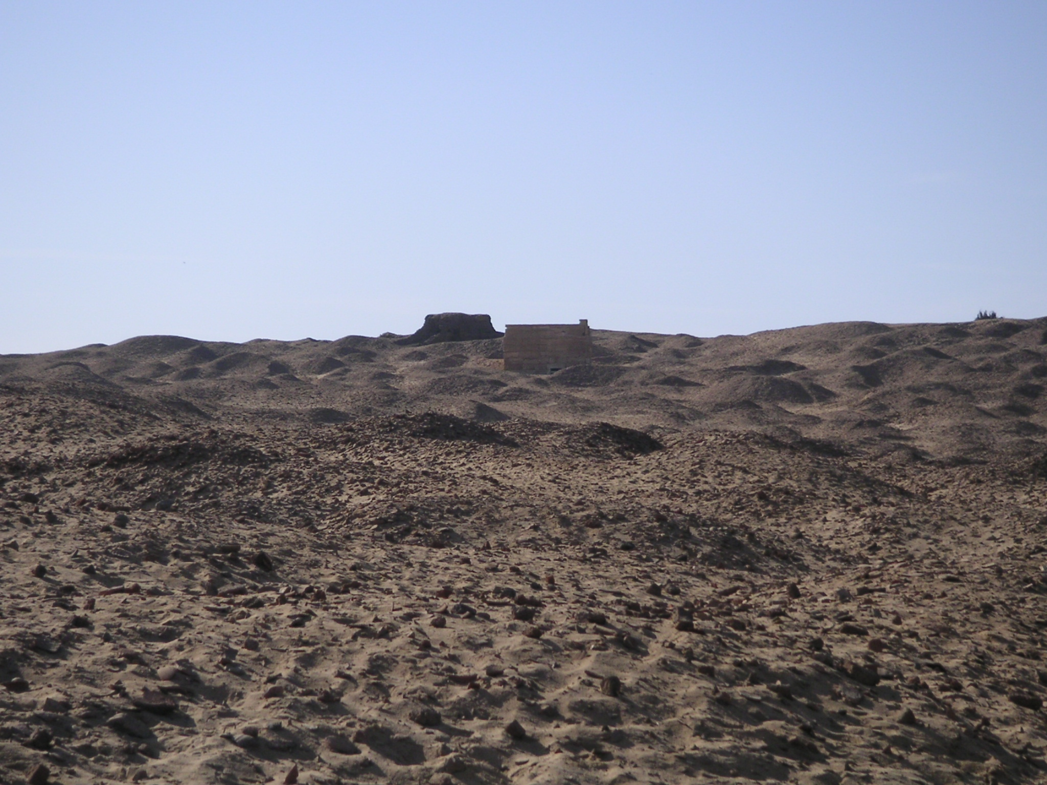 Vue du site de l'antique Térénouthis - la nécropole gréco-romaine - Kôm Abou Billou - novembre 2004